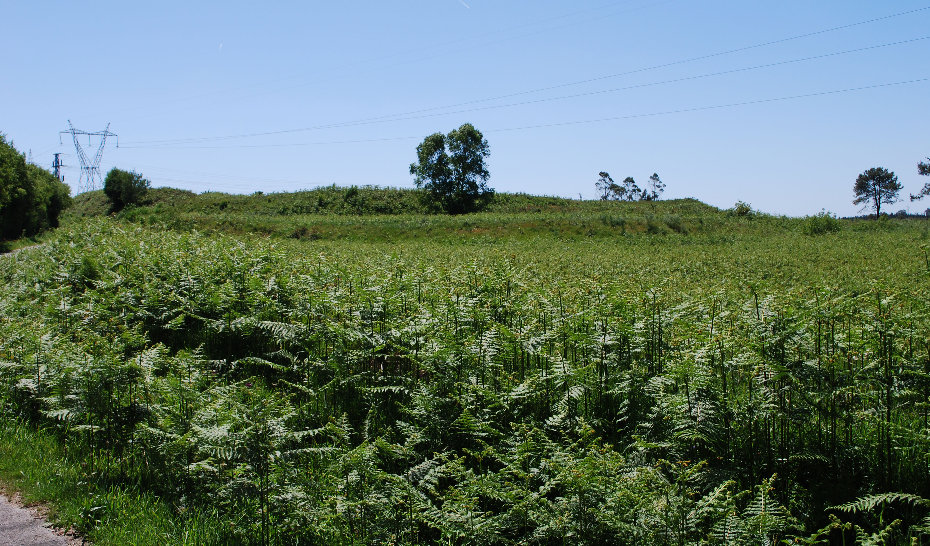 Vista do Castro das Travesas dende a estrada que o contornea, defensas. Carral A Coruña Galiza España